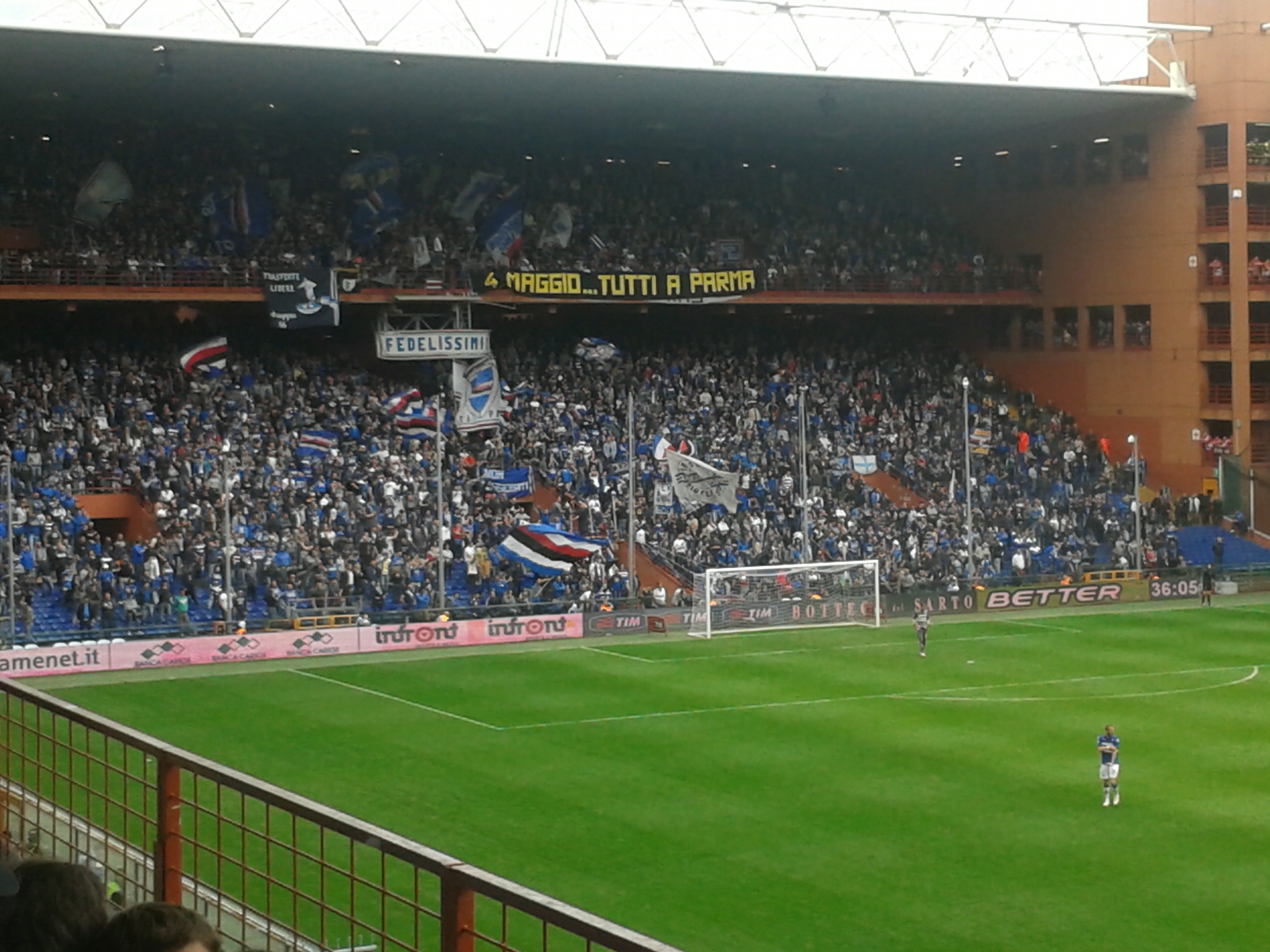 Fotografia della Gradinata Sud (Stadio Luigi Ferraris)